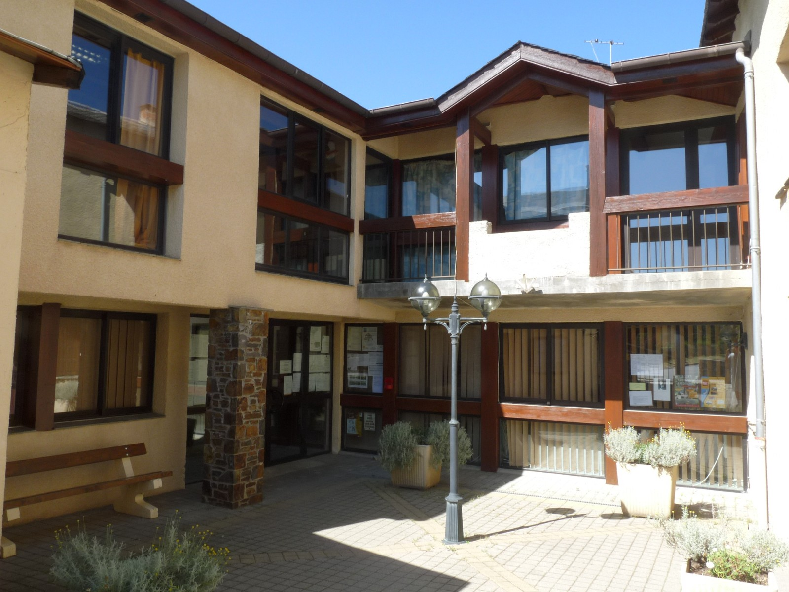 Mairie d'Estavar, Pyrénées-Orientales, France